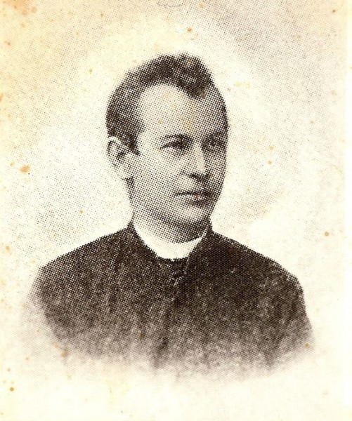 František Skalík (1867 - 1904), Český básník, překladatel a kněz .